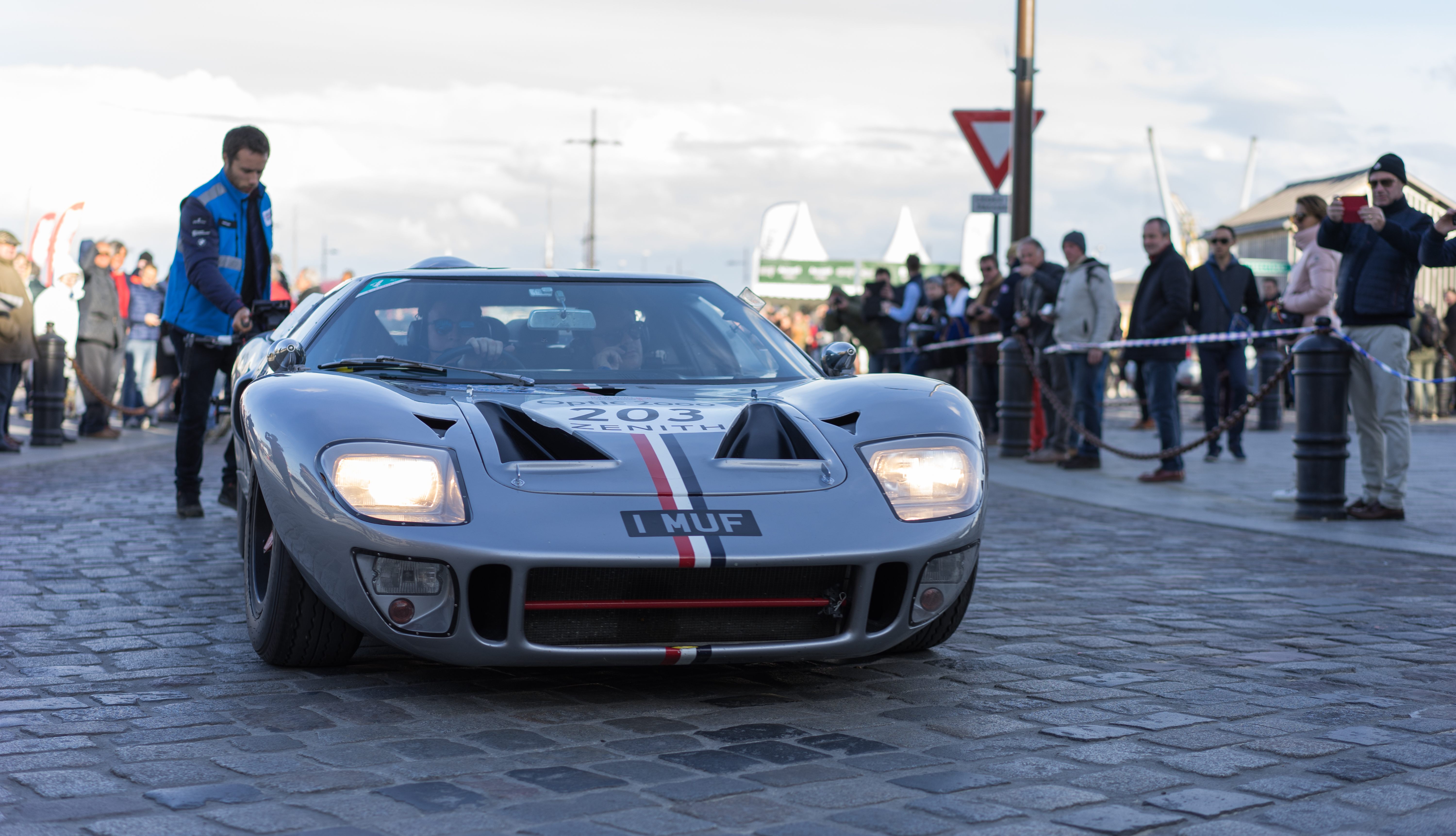 Tour Auto Optic 2000, étape St Malo. Competition GTP12 1.05